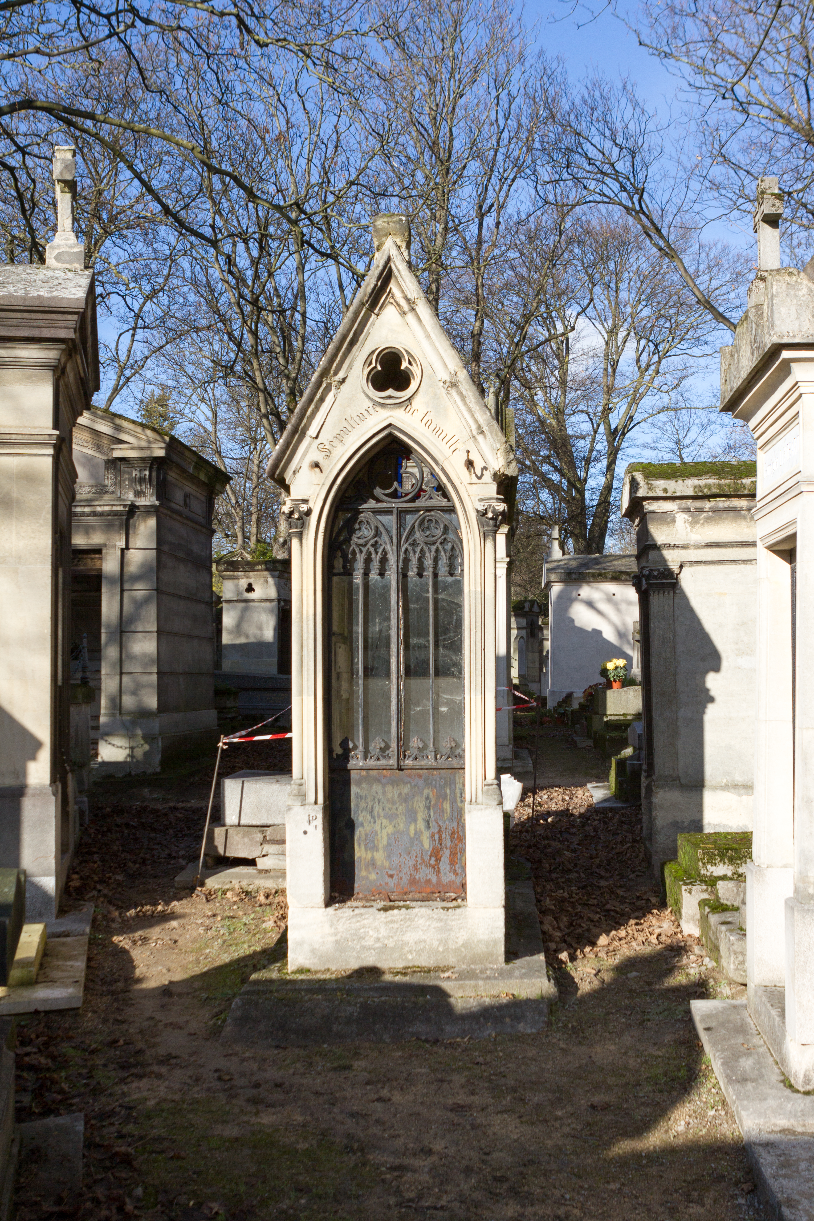 Sépulture de Alexandre-Jacques-François Brière de Boismont (1797-1881), médecin psychiatre ; Joseph-Guillaume-Anatole Faugère-Dubourg (1829-1887), poète et avocat ; Charles Rabot (1856-1944), géographe, glaciologue, voyageur, journaliste, conférencier, traducteur et explorateur, il a été le principal spécialiste français des régions polaires jusqu'à la Première Guerre mondiale.